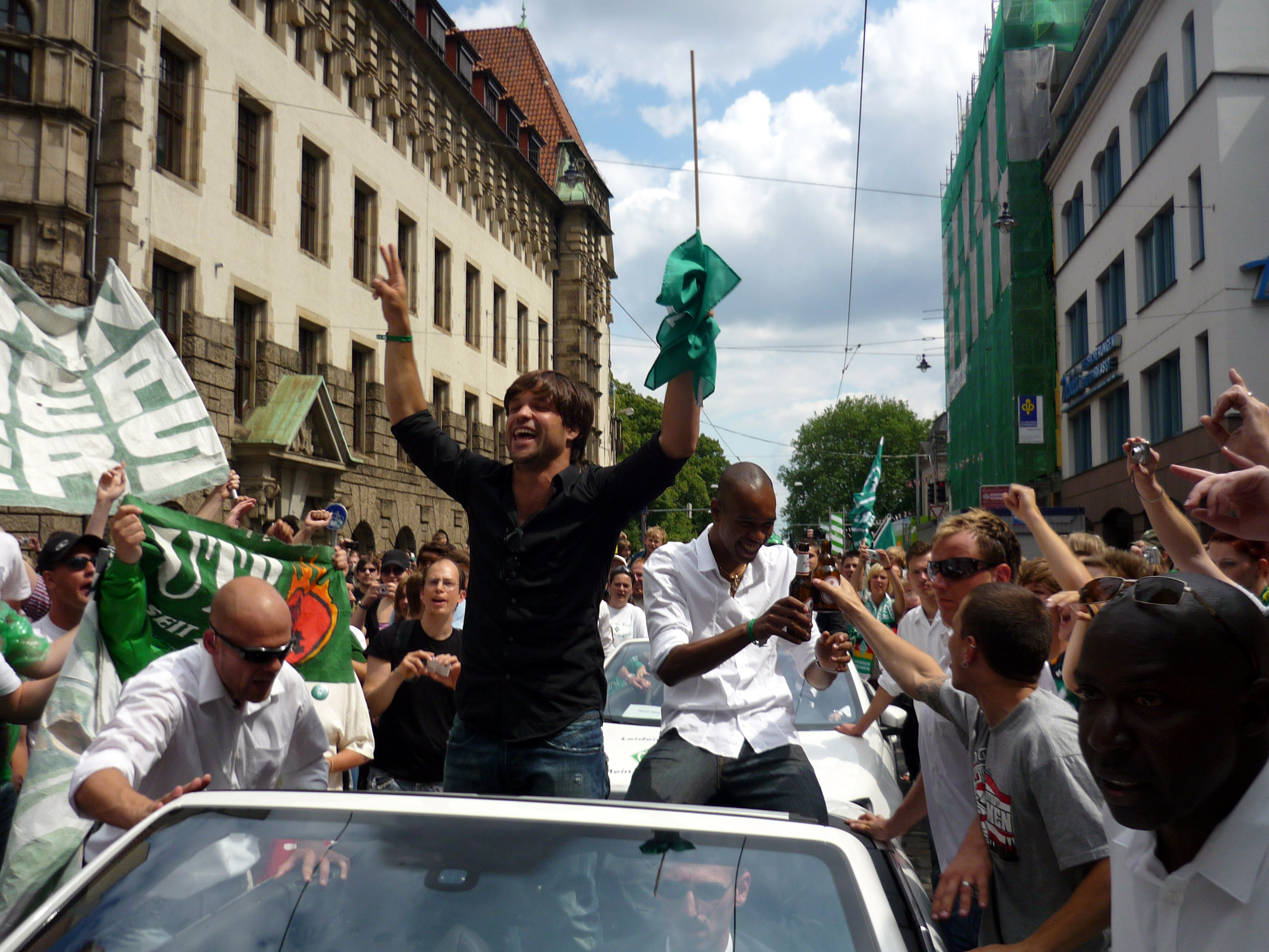 Naldo et Diego (Werder) lors de la célébration de la victoire en Coupe d'Allemagne